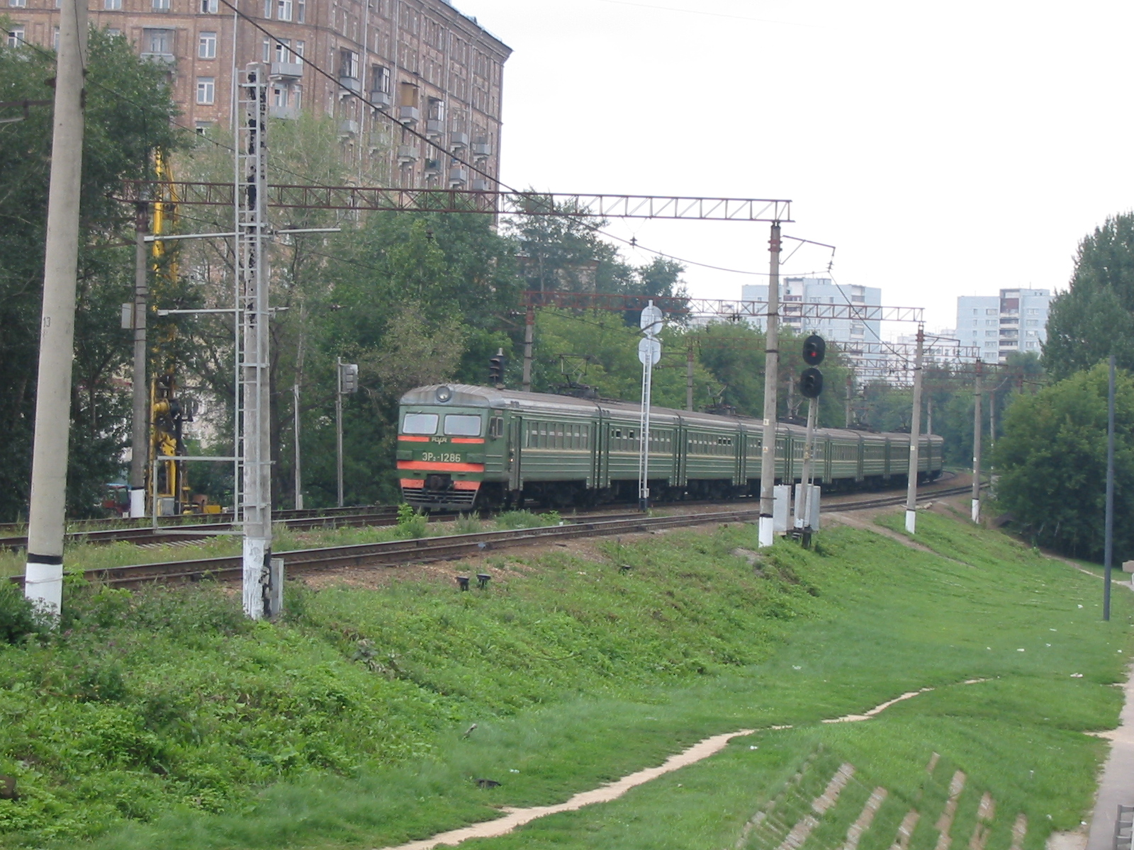 Павелецкое направление ж/д. Электропоезд ЭР2-1286. Дом № 2 по Варшавскому шоссе